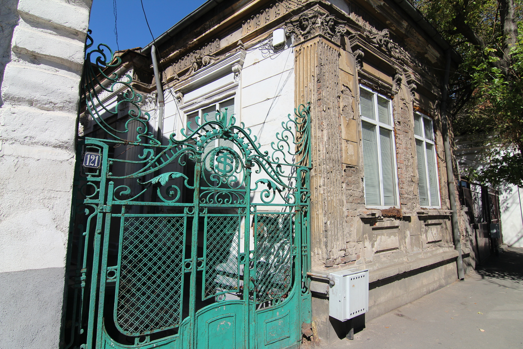 Casă pe strada Traian